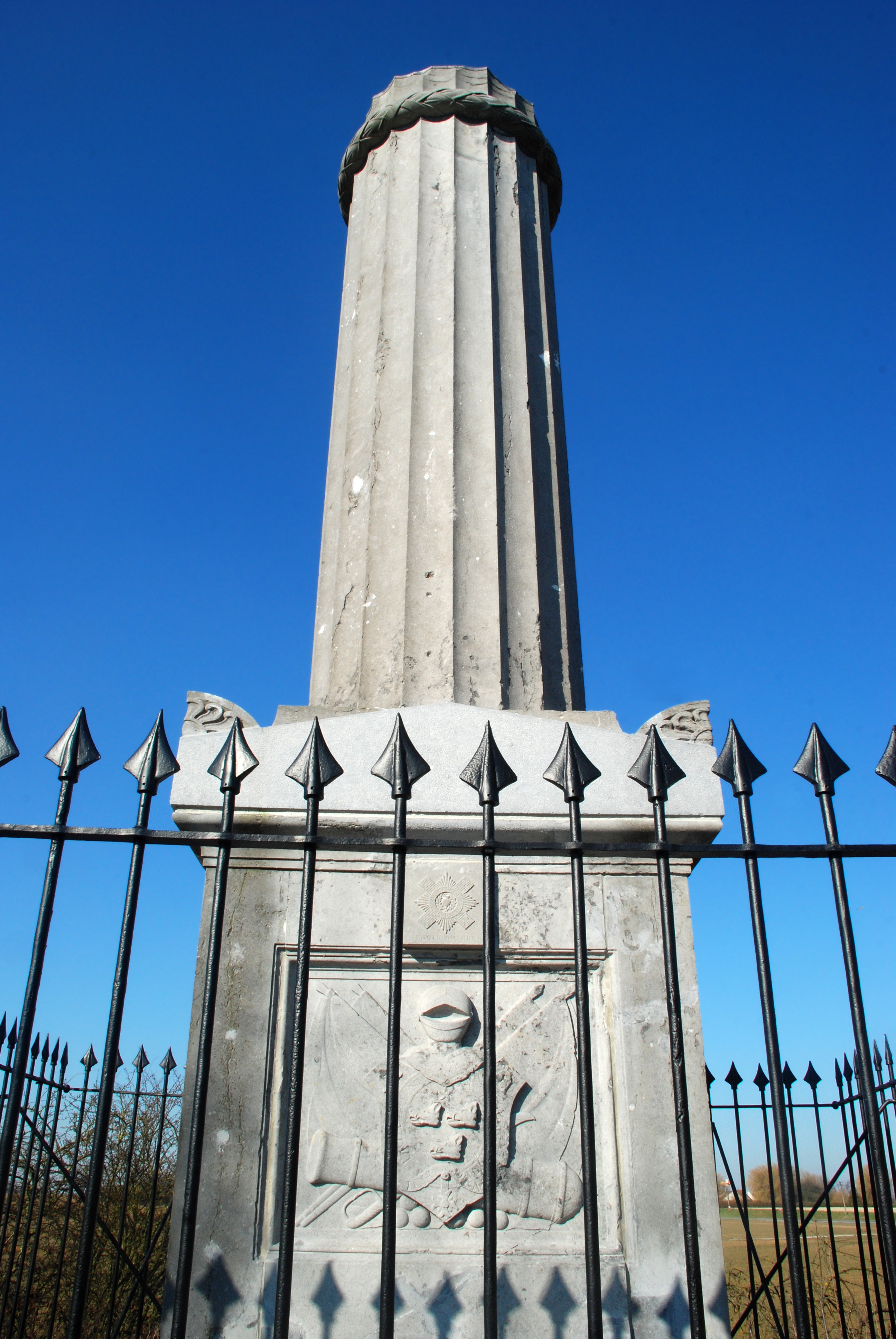 Belgique - Brabant wallon - Bataille de Waterloo - Monument Gordon